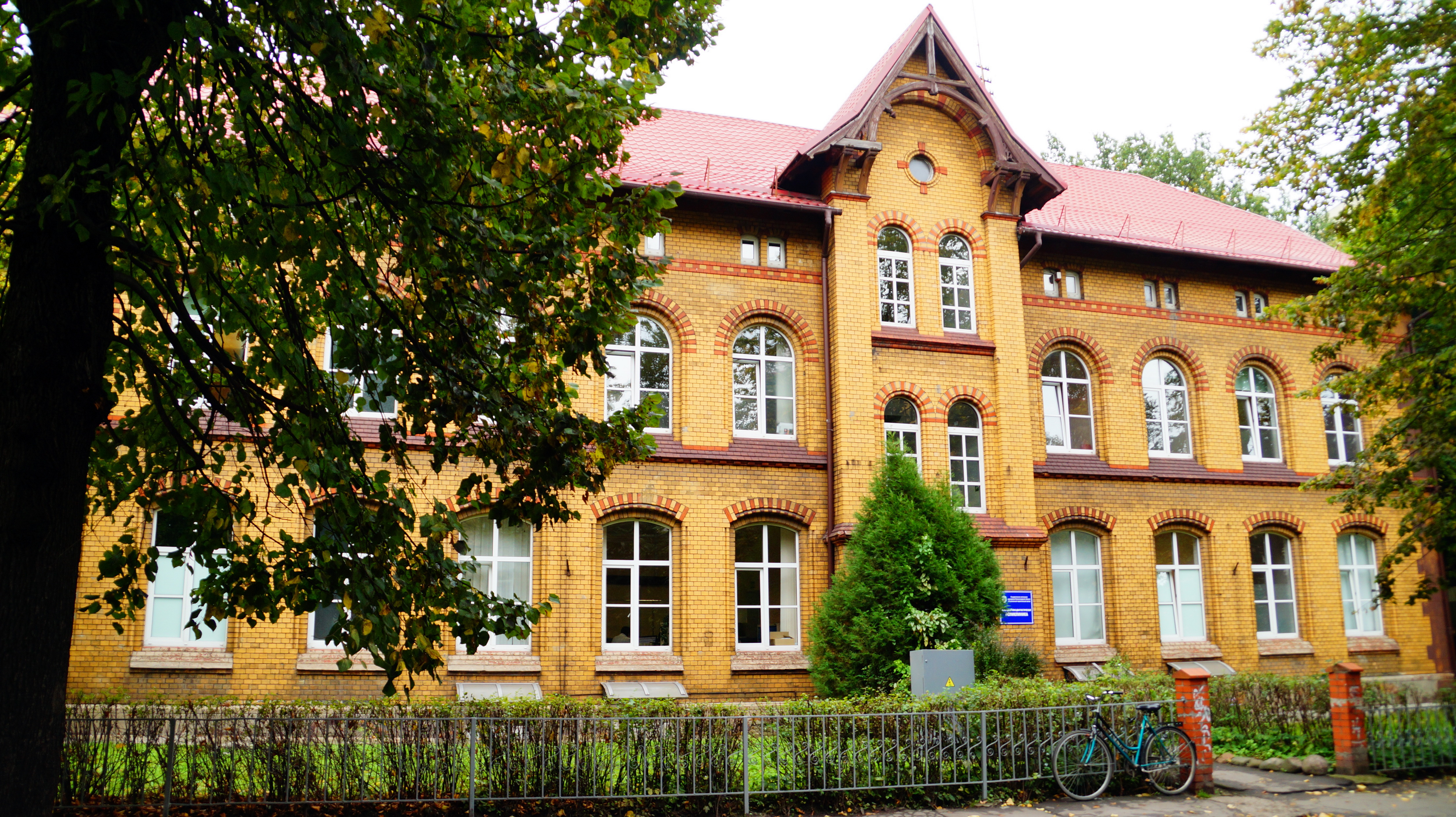 Жилой дом: улица Комсомольская, 36, Калининград, Калининградская область